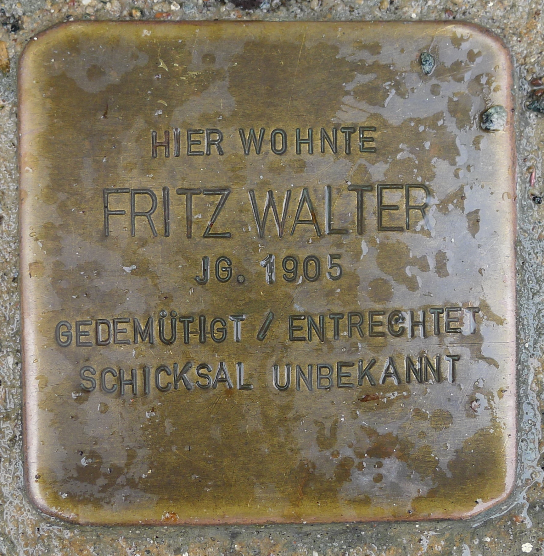 Stolperstein für Fritz Walter, Lange Straße 22, Greifswald